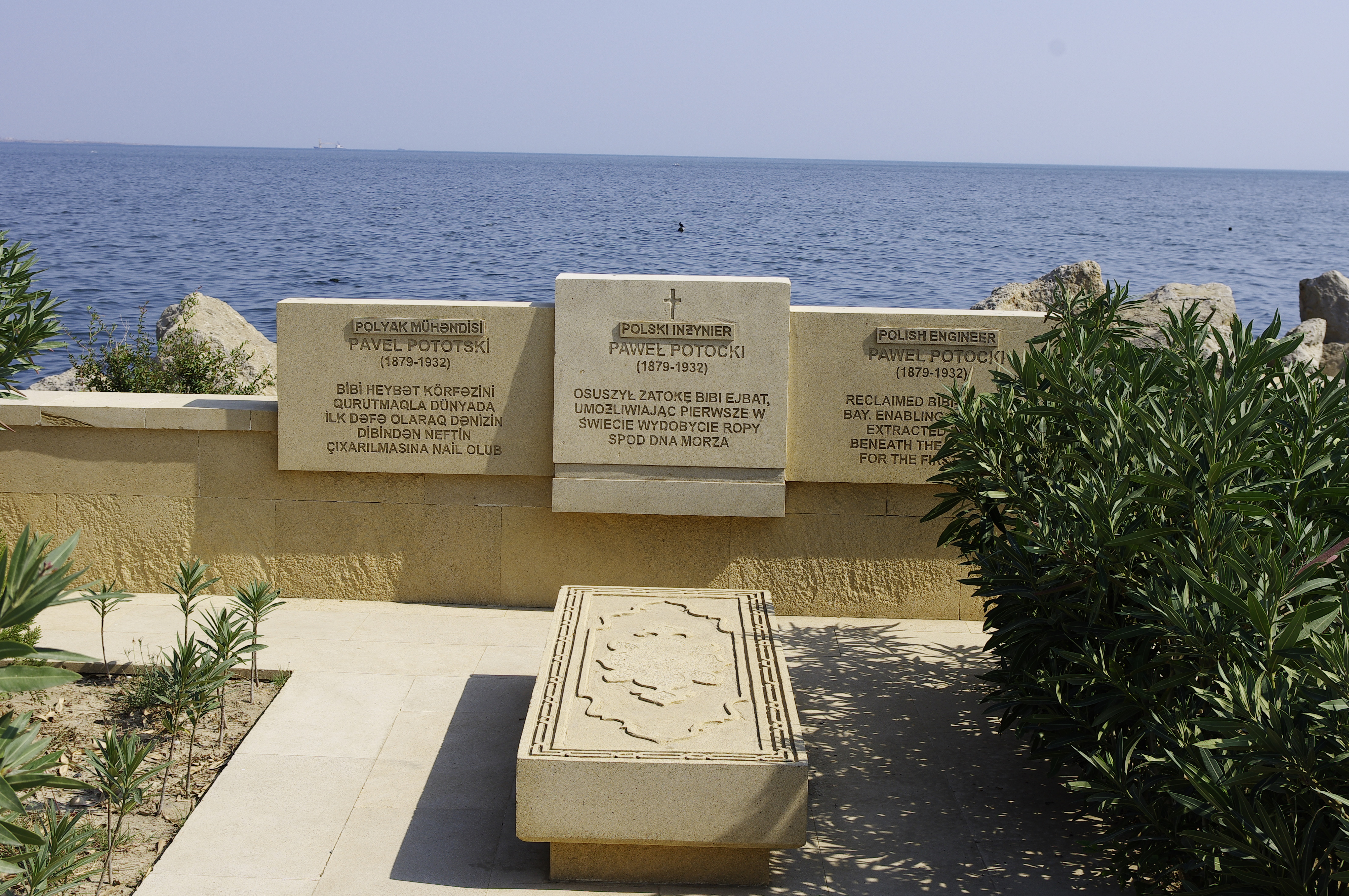 The making of this document was supported by Wikimedia Polska. To zdjęcie zostało wykonane podczas Wikiwyprawy 2015.Wszystkie zdjęcia z wyprawy możesz zobaczyć w kategorii: Wikiwyprawa 2015. English | polski | +/− To zdjęcie zostało załadowane dzięki współpracy z firmą Hyperbook. polski | +/− To zdjęcie zostało załadowane dzięki współpracy z firmą: Kopex Group. English | polski | +/−